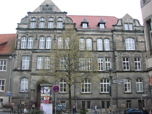 Gebäude des Max-Planck-Gymnasiums am Albanikirchhof in Göttingen.